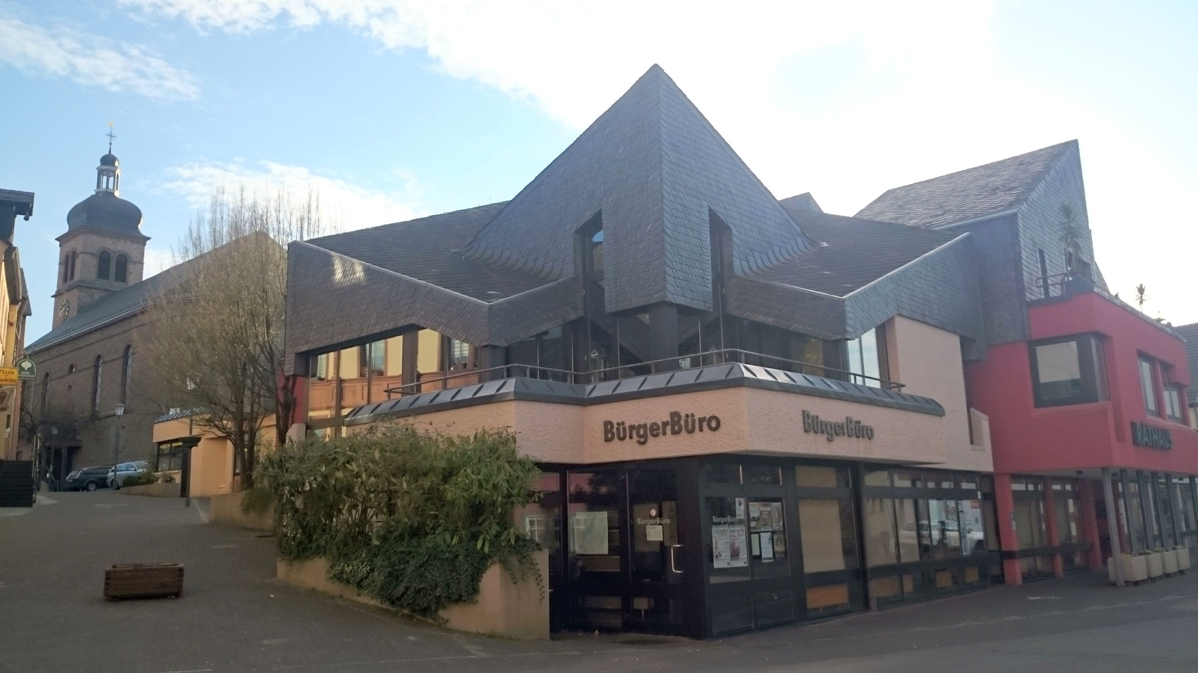 Hillesheim